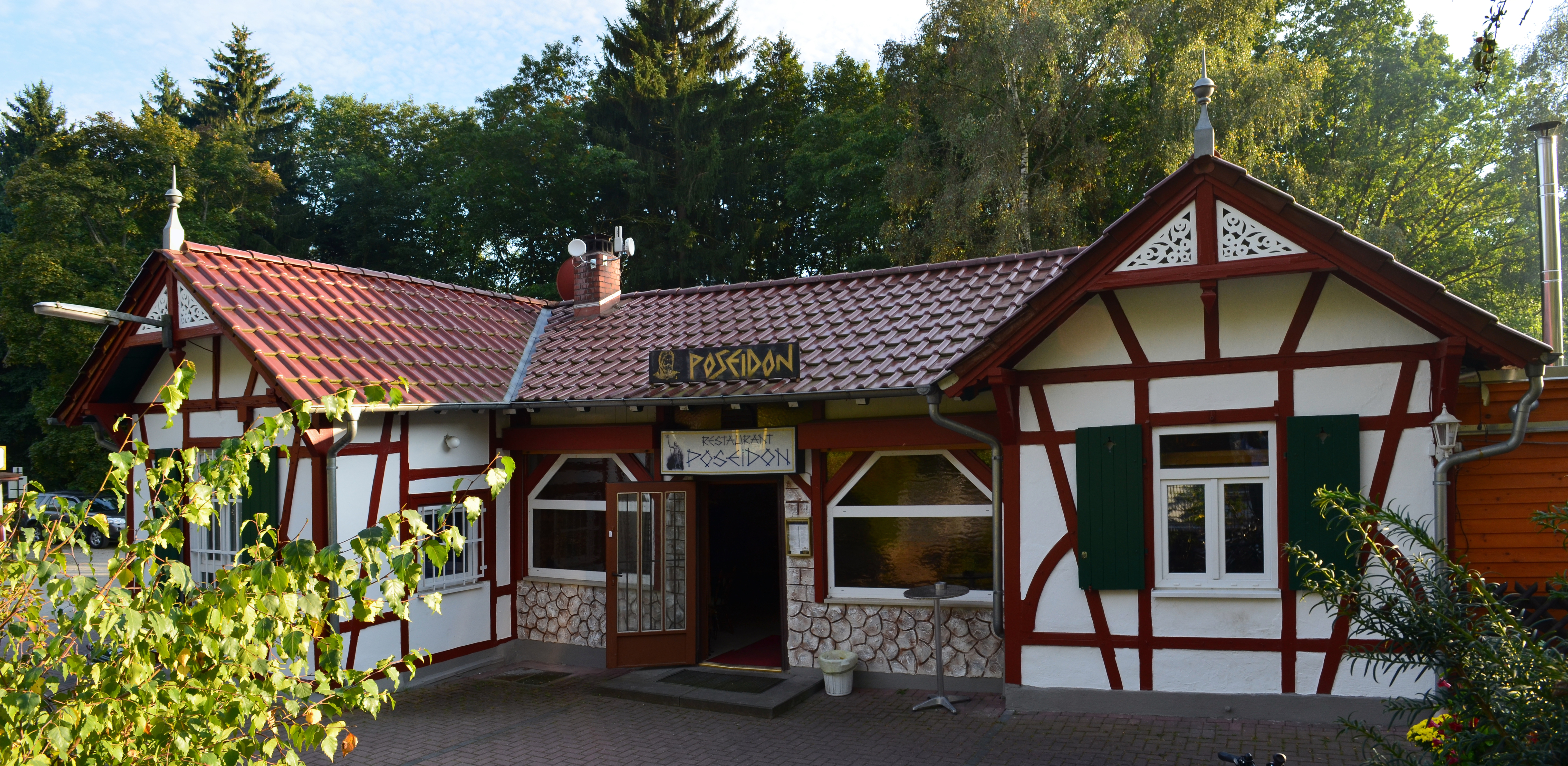 Köppern, Bahnhof Saalburg